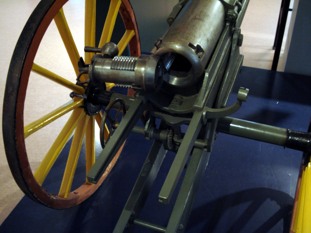 63 mm Baranovsky gun